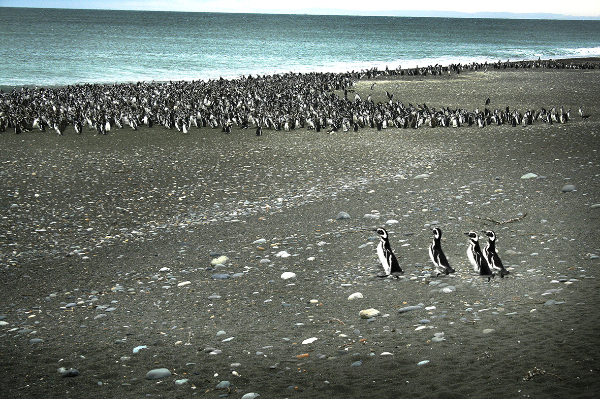 Colonia de pingüinos magallánicos en Cabo Vírgenes.